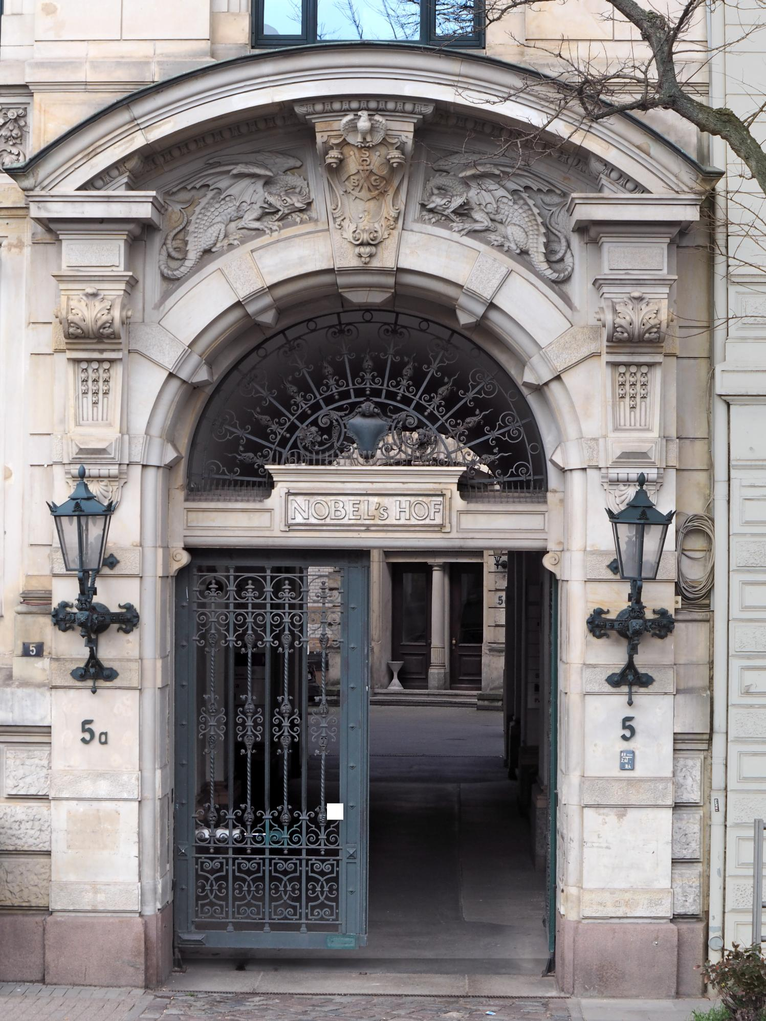 Hamburg-Altstadt, Nobelshof, Portal, Foto: 2016